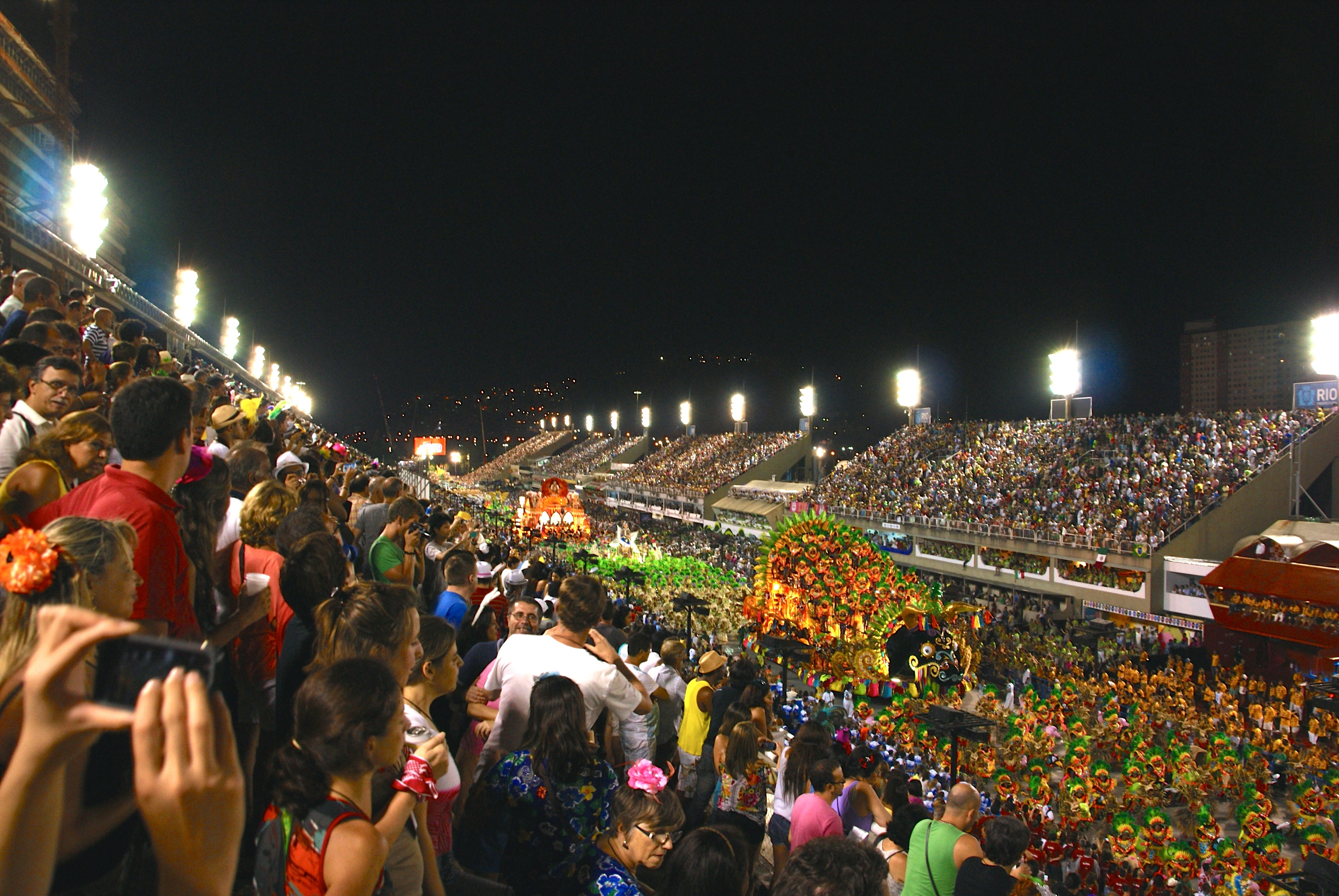 Rio Sambadrome